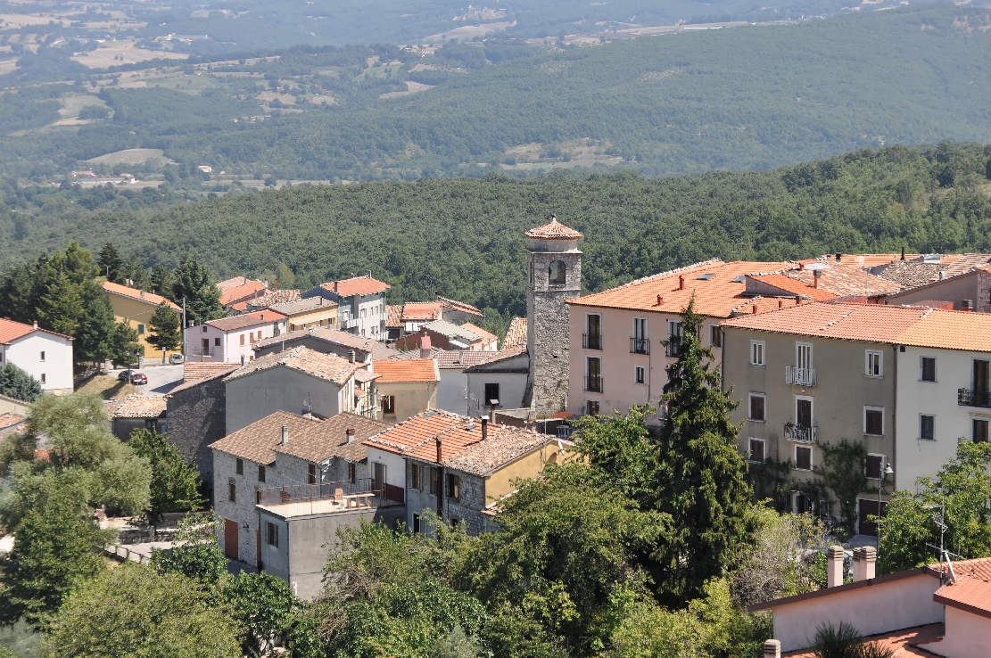 Sepino 2012 Dieses Foto entstand in Zusammenarbeit mit Stadtbesichtigungen.de Die Seiten Stadtbesichtigungen.de, der dazugehörige Reise Blog sowie die Facebookseite: Stadtbesichtigungen Rom dürfen dieses Bild für Ihre Veröffentlichungen ohne den Hinweis auf Wikipedia, Commons bzw der Lizenz verwenden. Die Verantwortlichen habe von mir (Ra Boe) die Originaldaten zur freien Verfügung übermittelt bekommen.